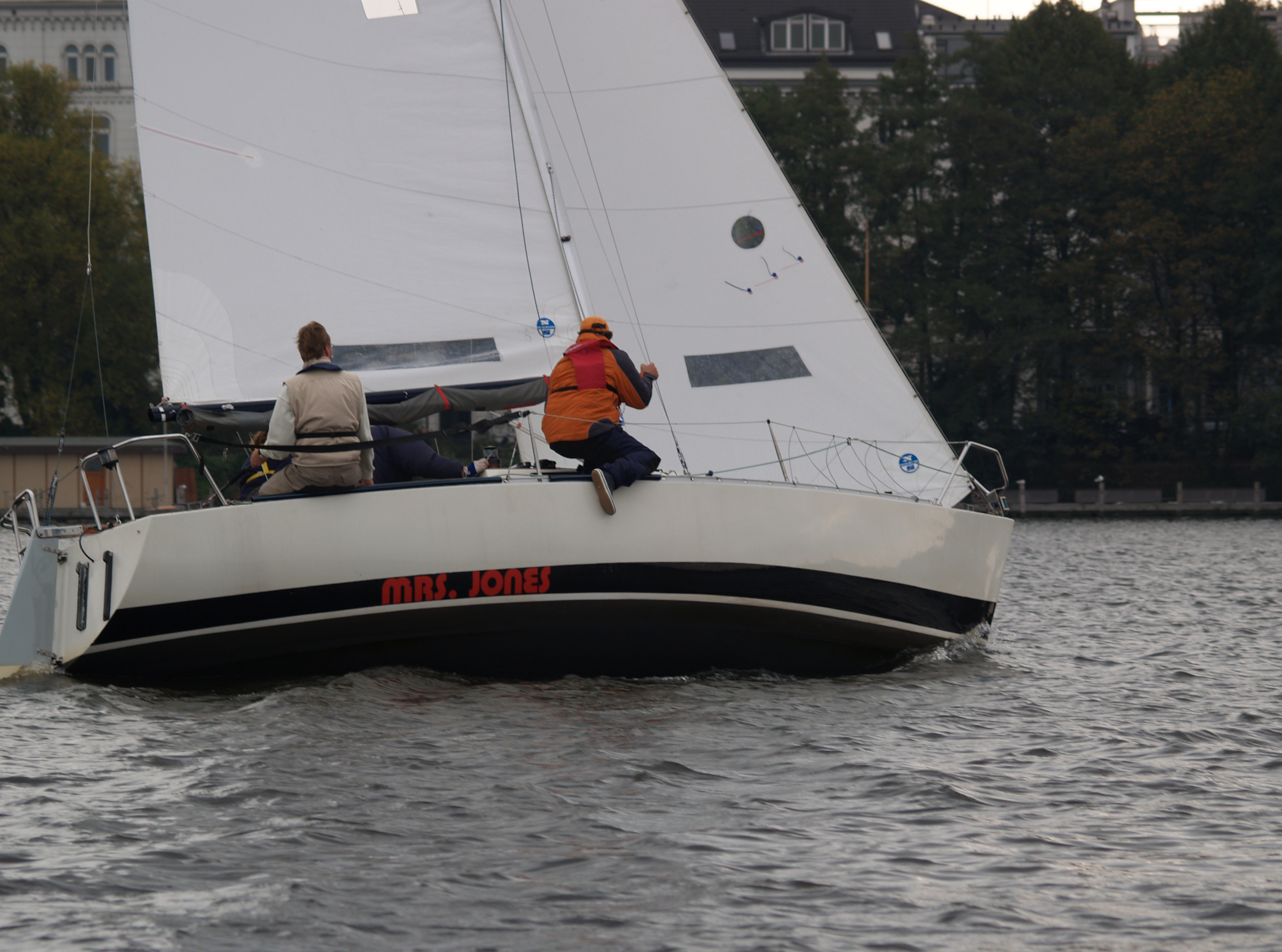 Albin Express sailing boatpa217425.jpg